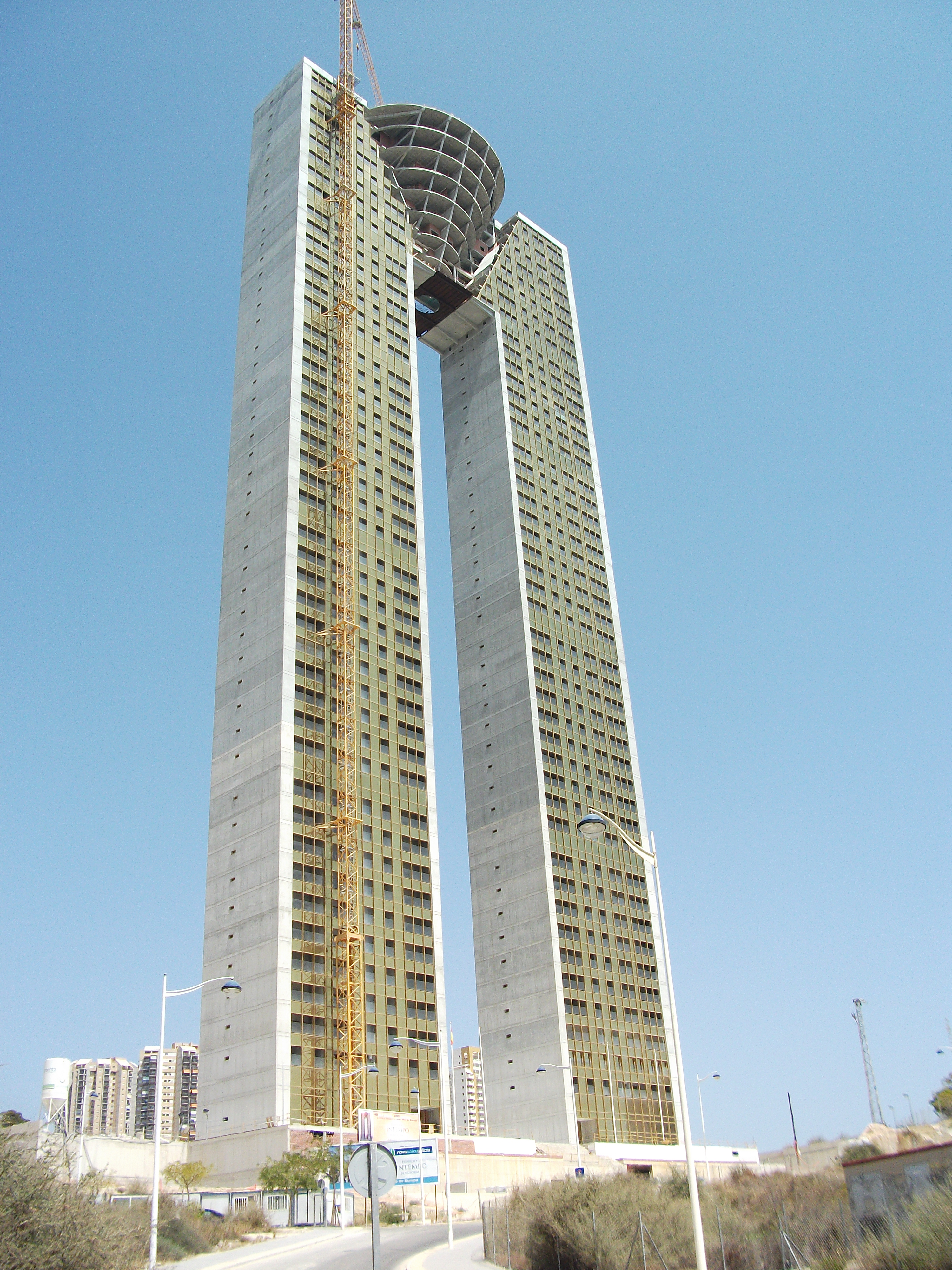 Edificio In Tempo, Benidorm, Alicante (España)